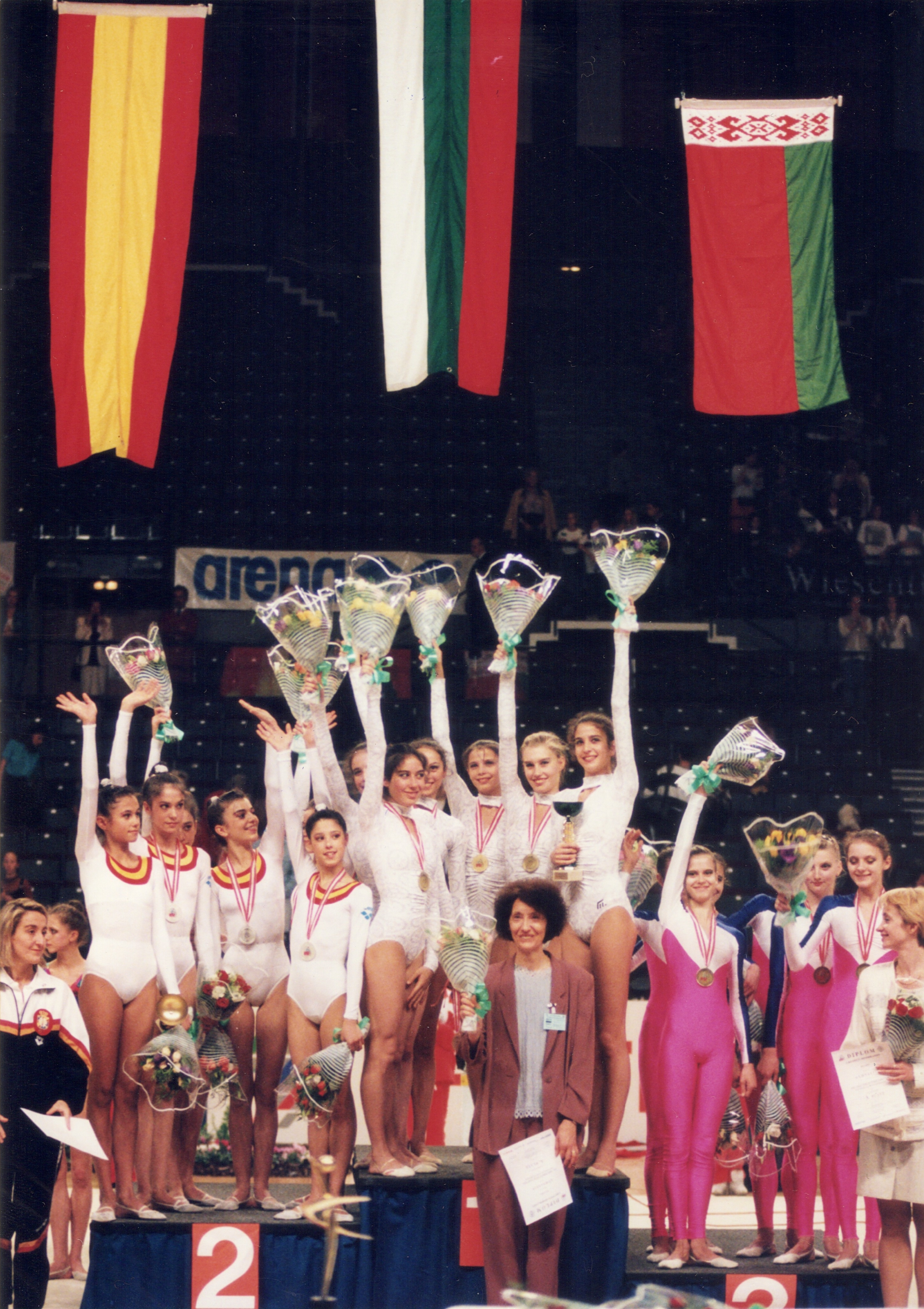 Podio del concurso general de conjuntos en el Campeonato Mundial de Gimnasia Rítmica de 1995 en Viena. De izquierda a derecha: España, Bulgaria y Bielorrusia.